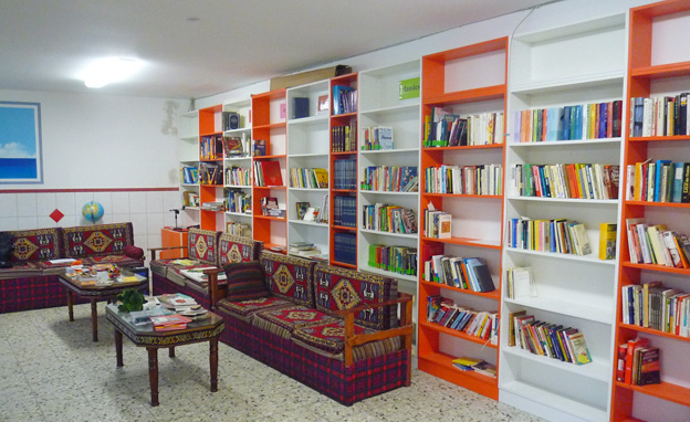 Ein Einblick in das Lesecafé, welches die OBS und der VIKZ zusammen gegründet haben.